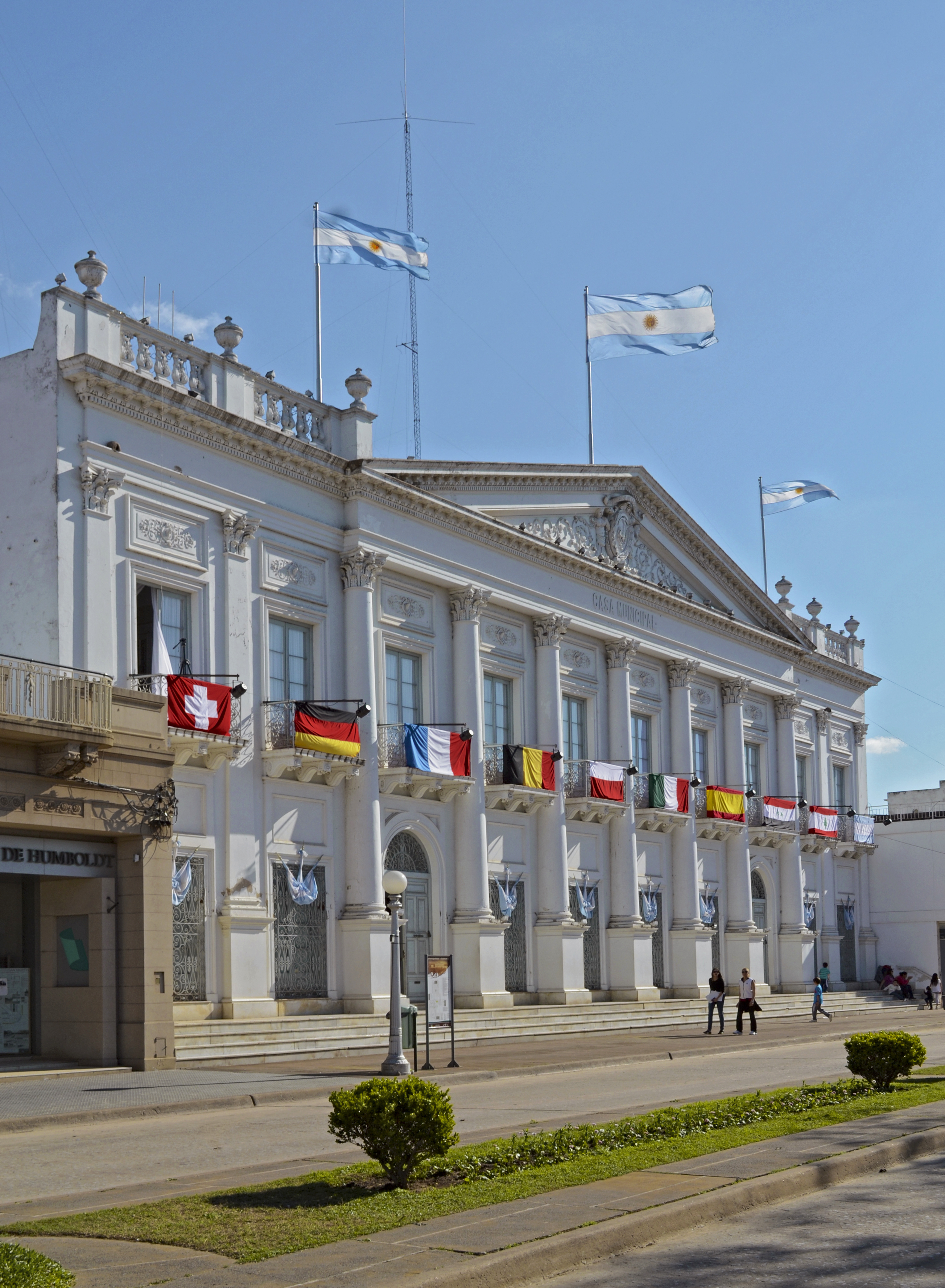 Municipalidad de Esperanza, Santa Fe